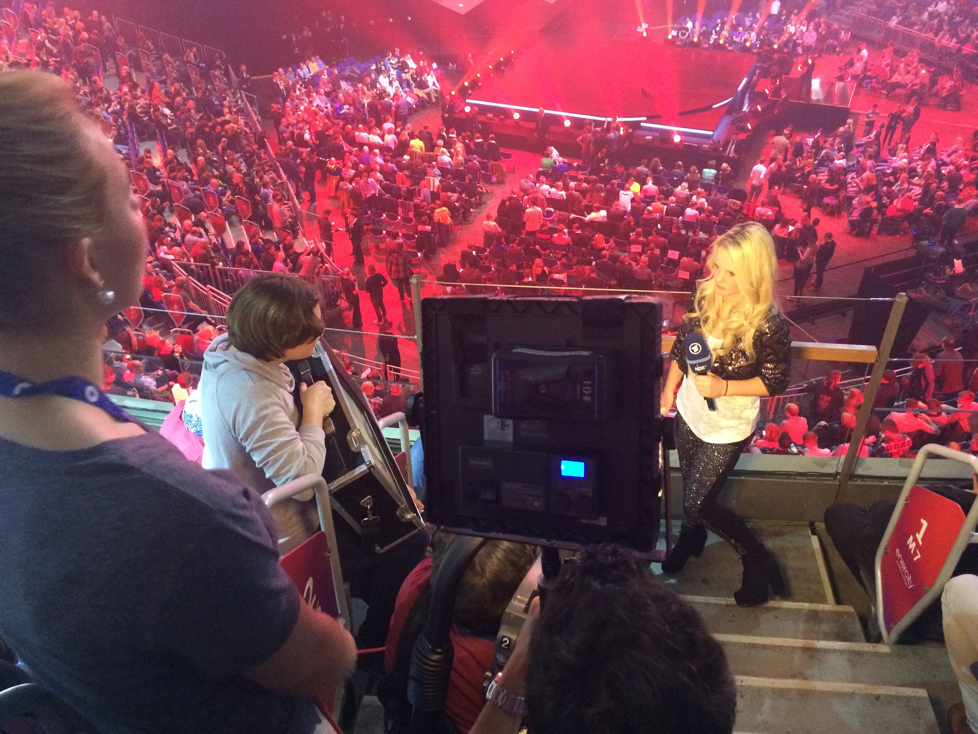 Tina Zemmrich beim ESC-Vorentscheid in Hannover 2015 in der TUI-Arena